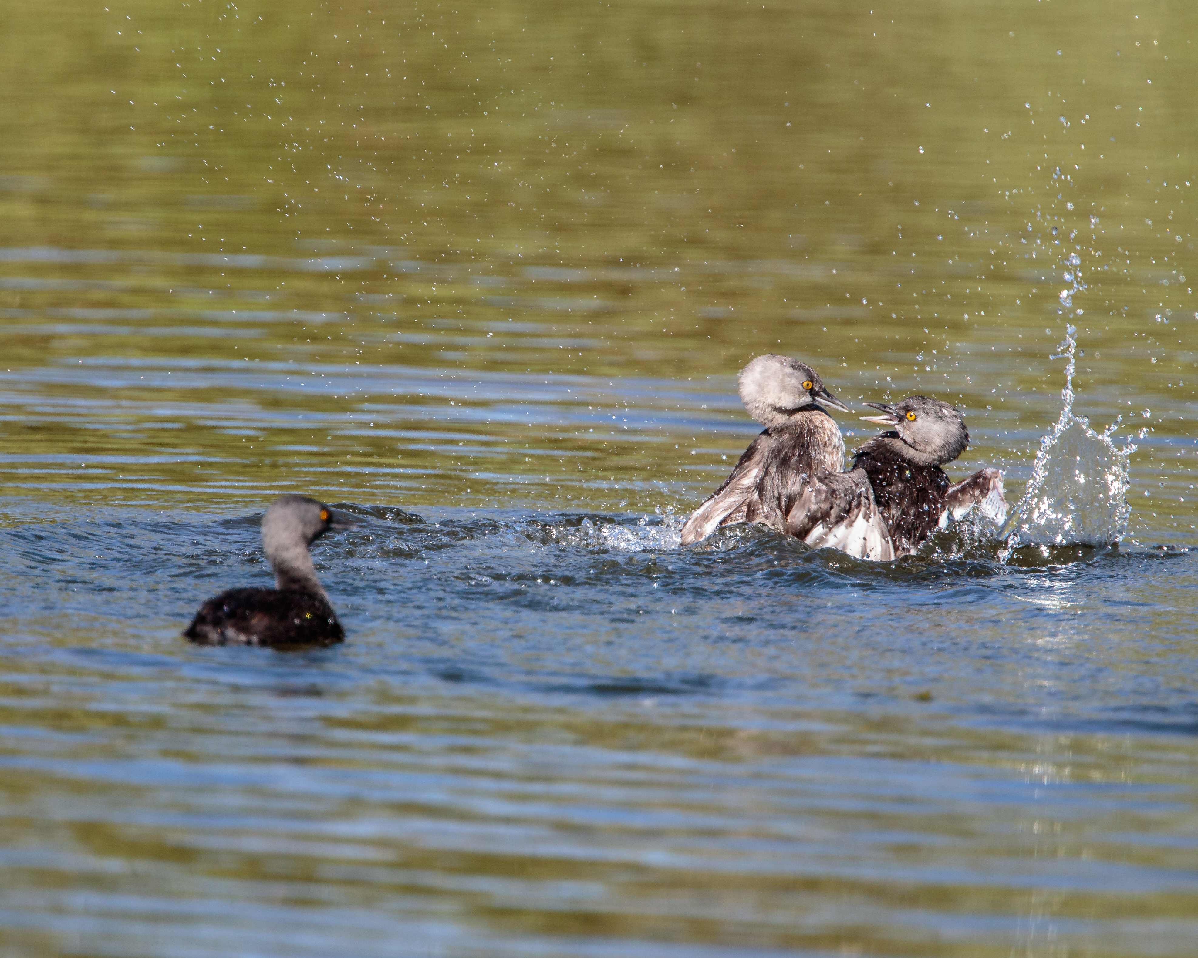 Taken in Texas